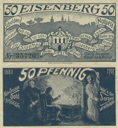 Notgeld aus Eisenberg von 1921: 50 Pfennig